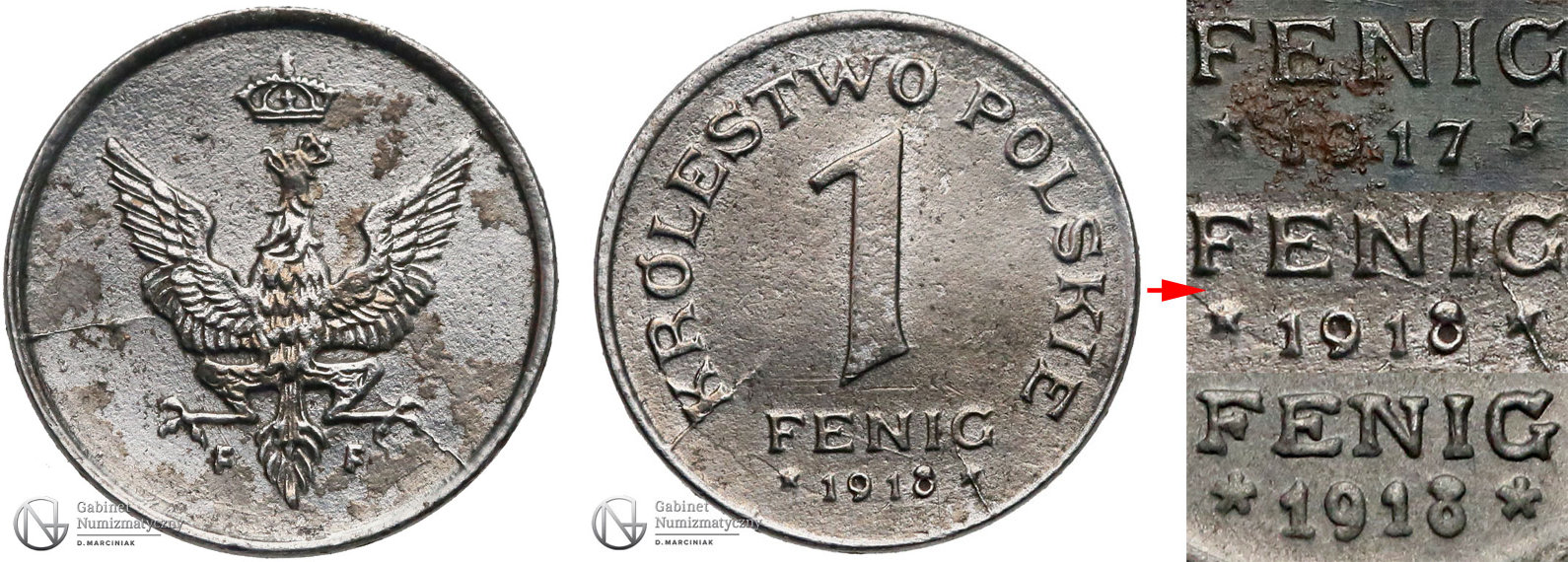 1 fenig 1918 rewers jak 1917